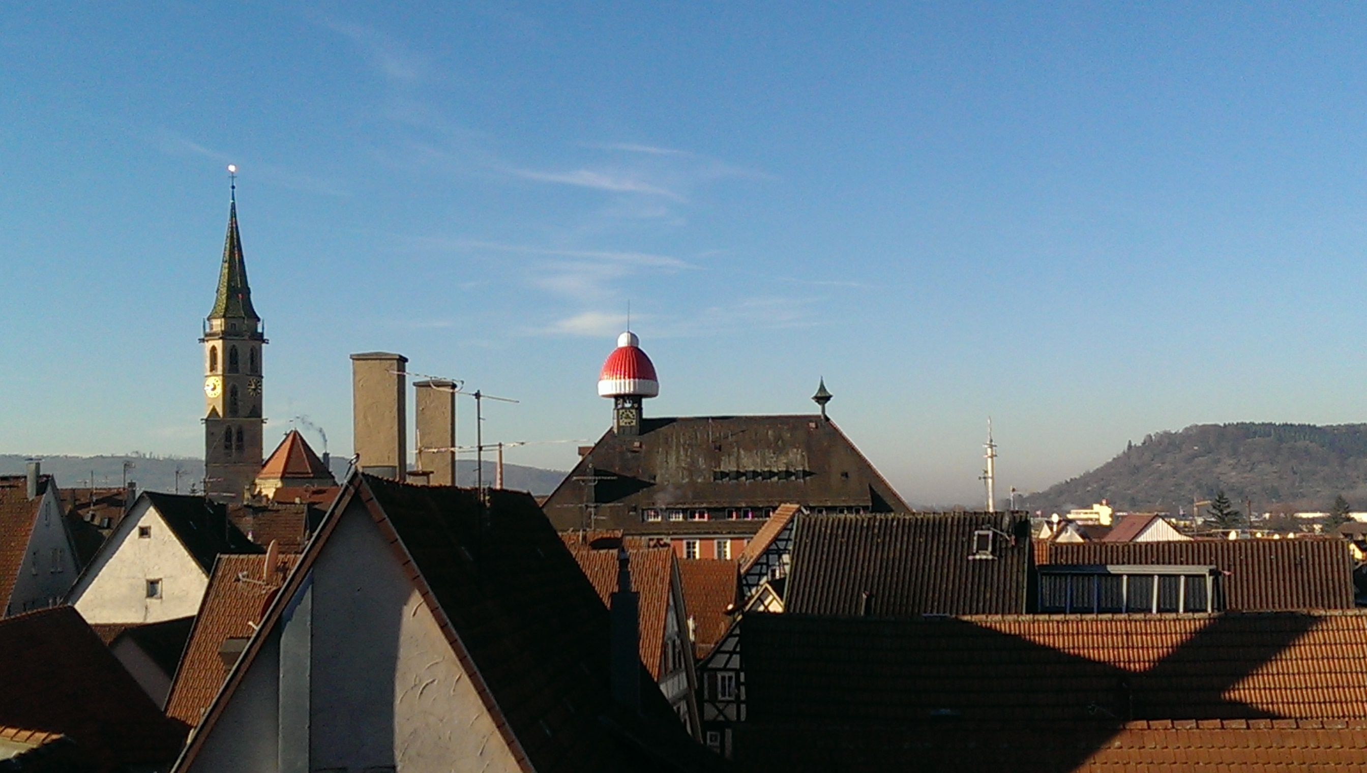 Dächer von Schorndorf